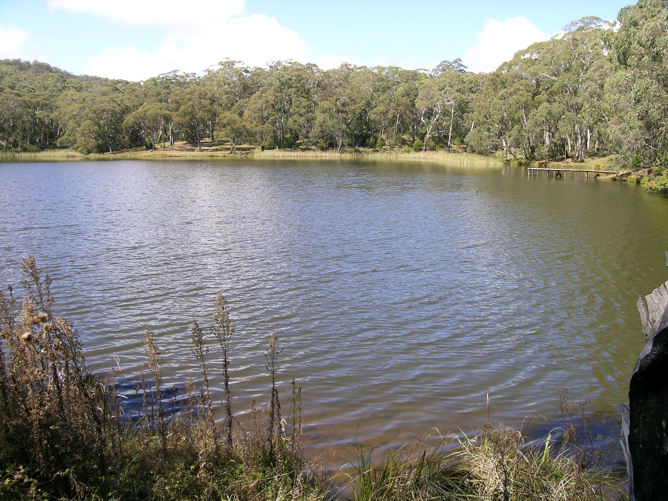 Sheba Dam No. 1, Hanging Rock, NSW